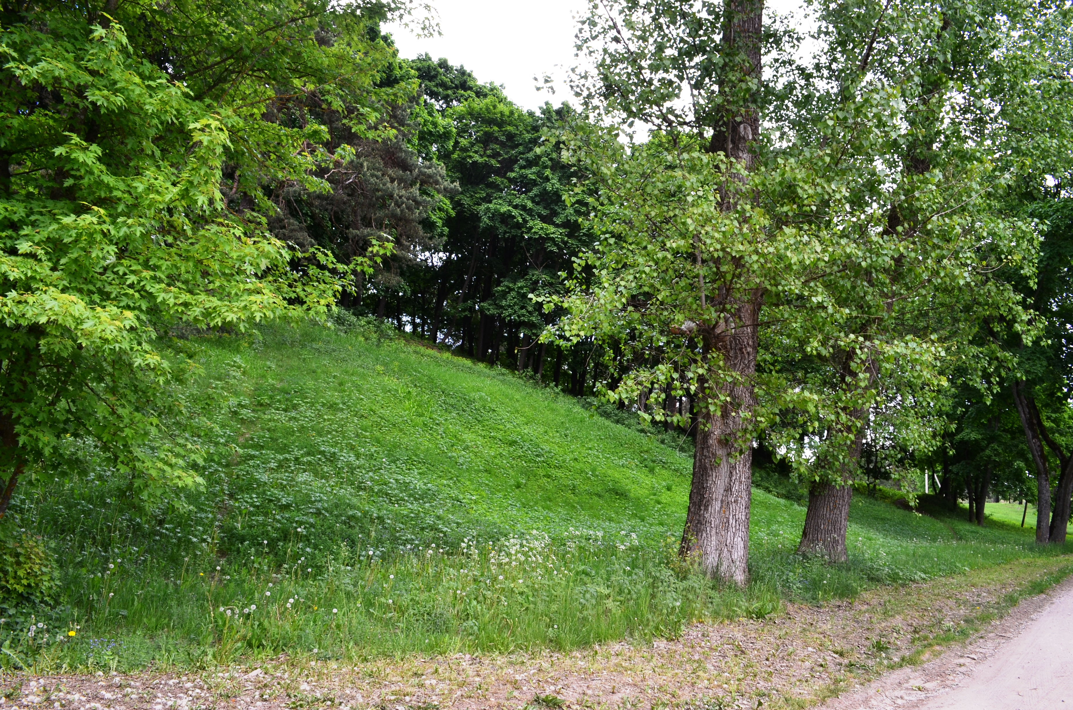 Pilaitės piliakalnis, Pilaitė, Vilnius